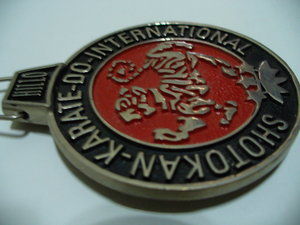 Medalla de plata de la Copa Ishikawa en Honor al Sensei Hiroshi Ishikawa Toda.